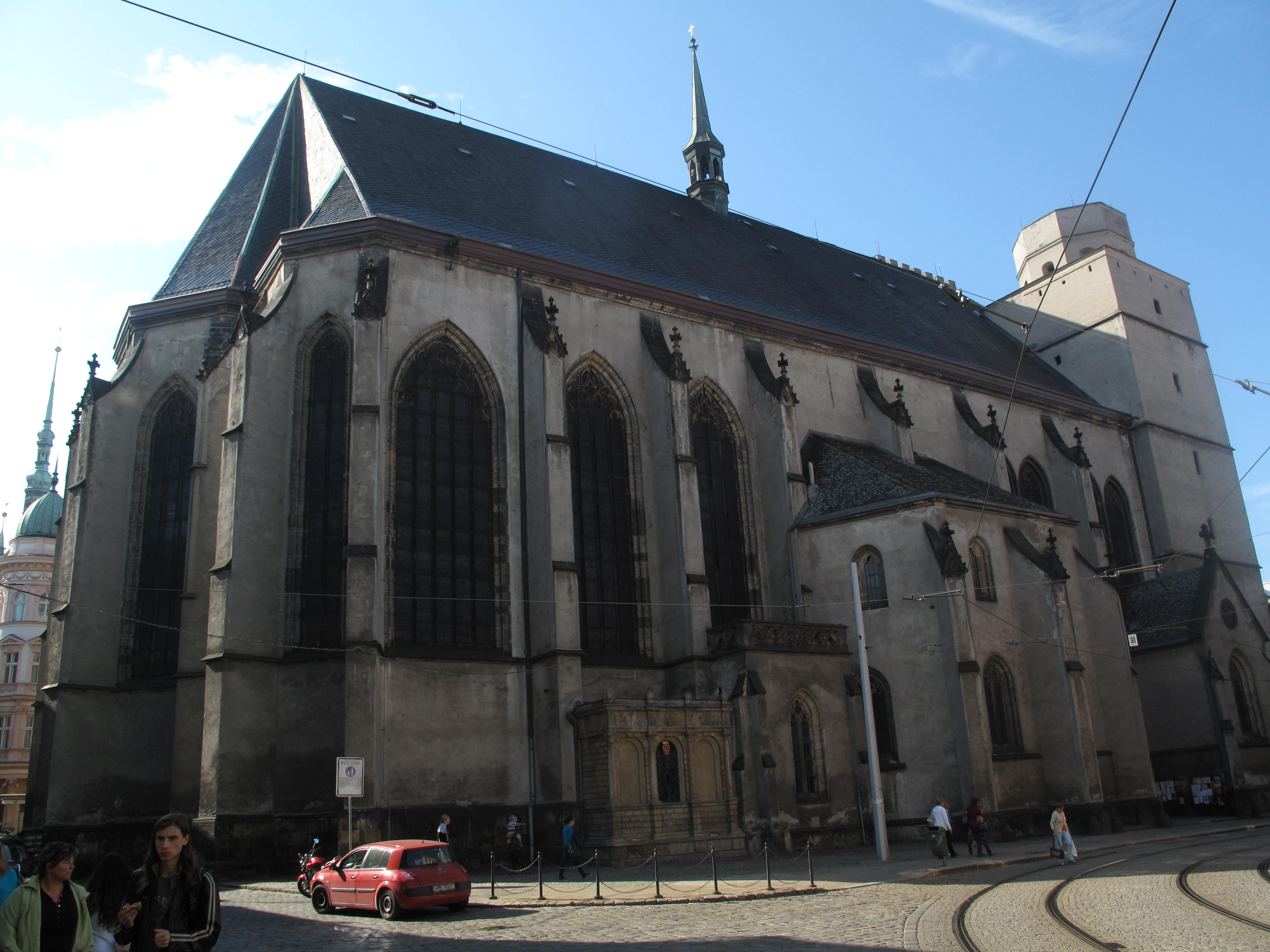 Česky: Olomouc